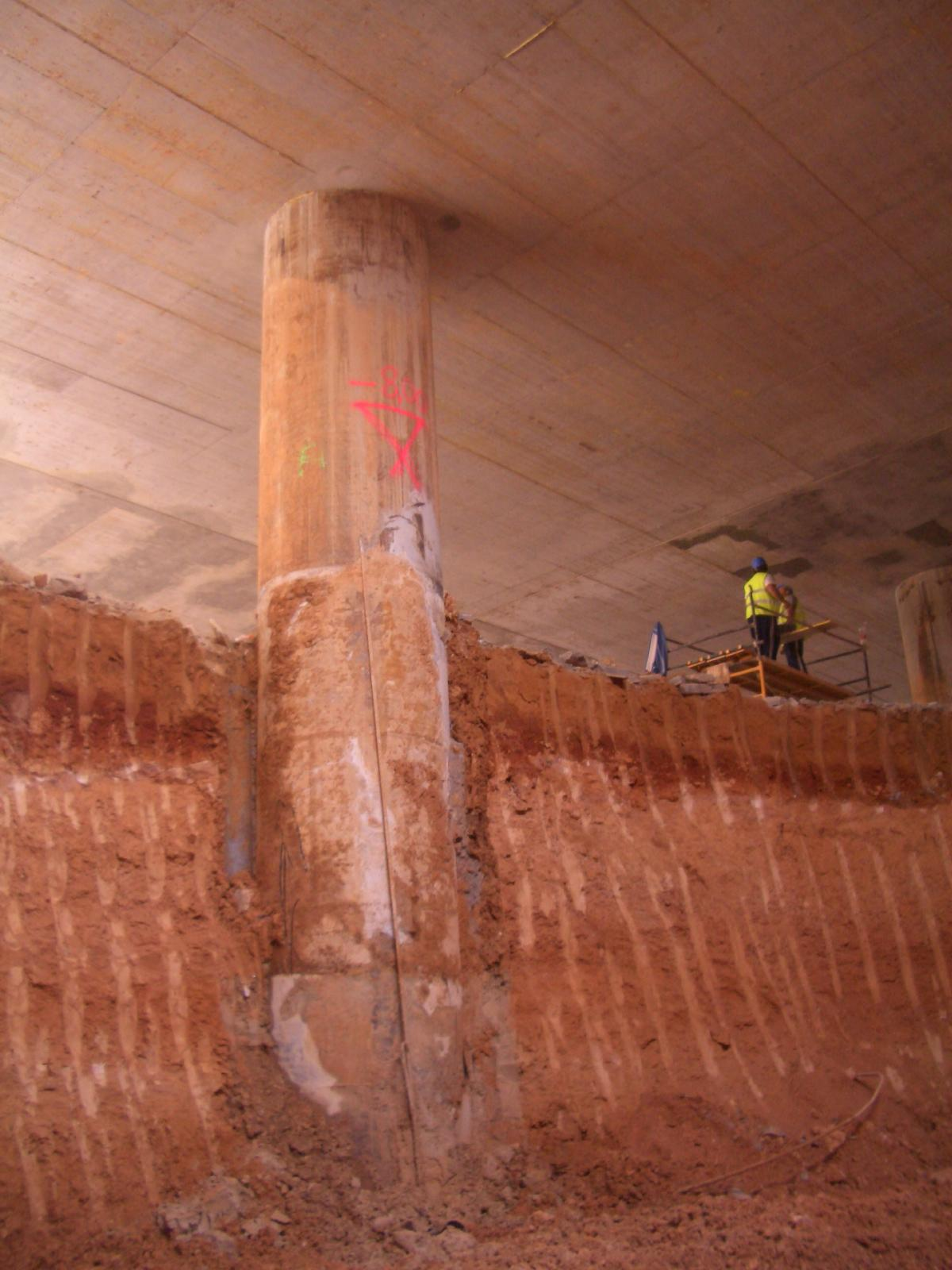 Aushub unter dem Deckel mit Pfahlstütze im Stahlmantel